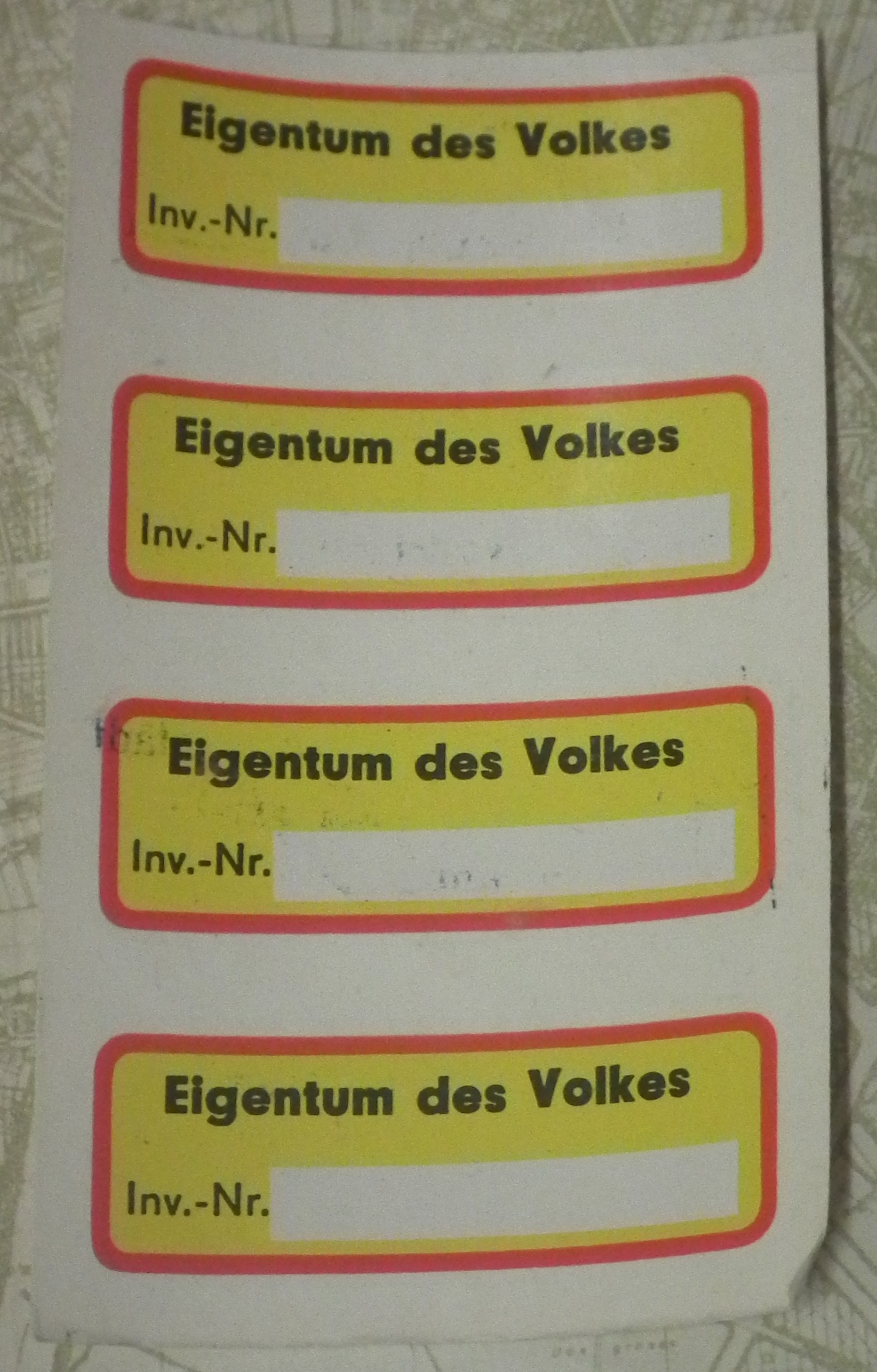 Aufkleber Eigentum des Volkes Inv-Nr, DDR-Museum Pirna, Veröffentlicht mit Genehmigung der Museumsleitung